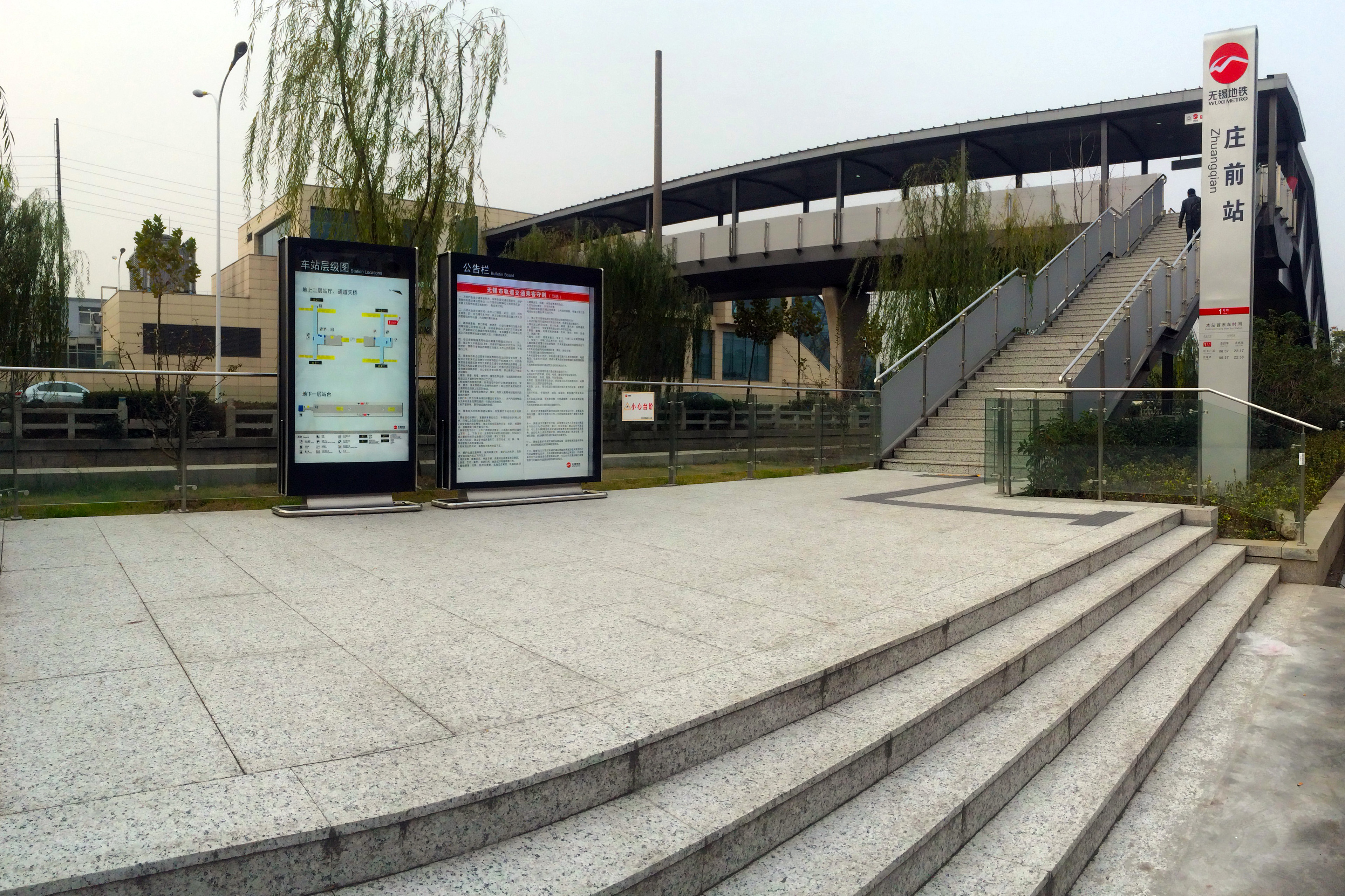 無錫地鐵1號線莊前站3號出入口